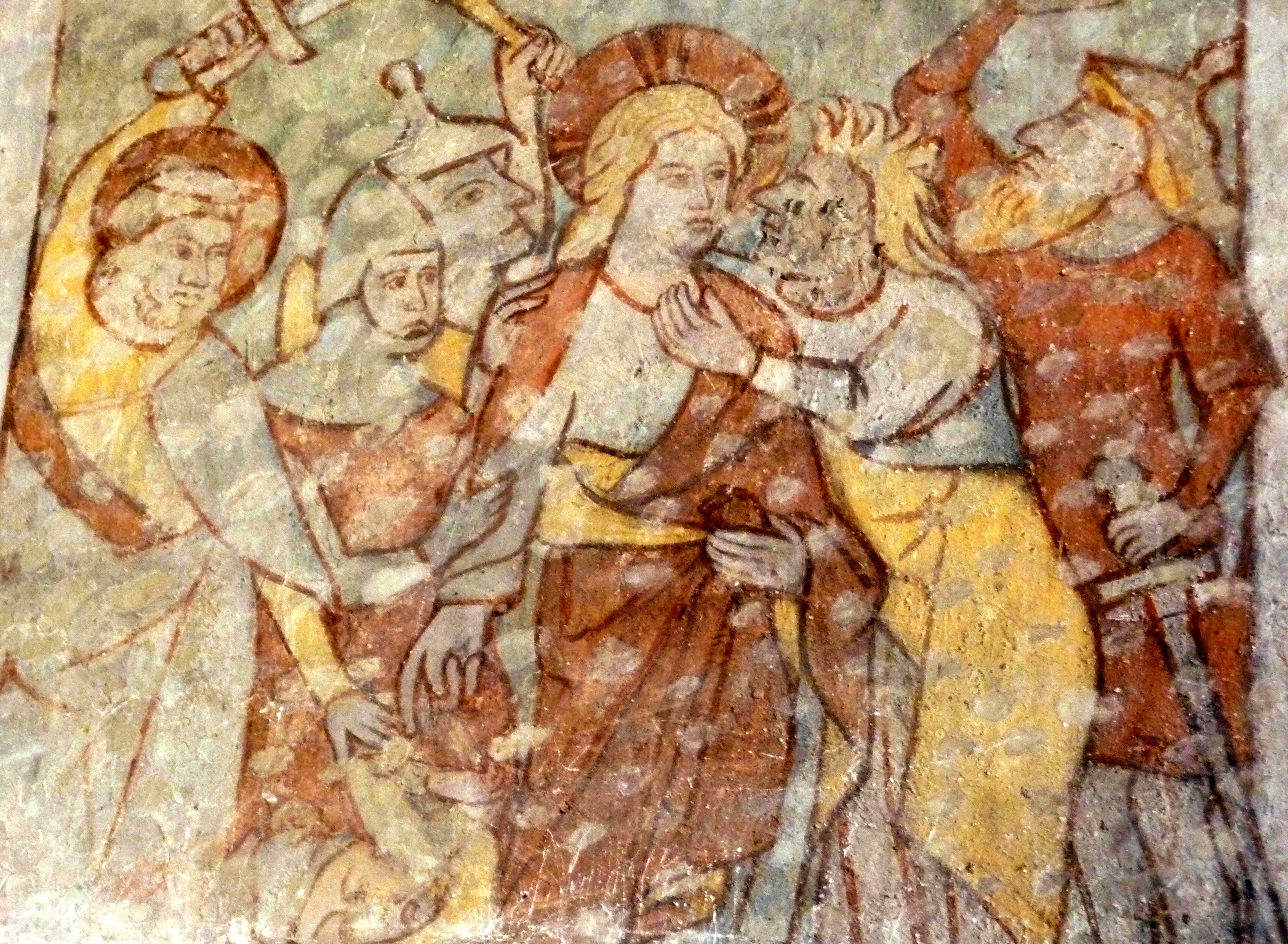 Katholische Pfarrkirche St. Stephanus in Hainhofen (Neusäß), gotischer Freskenzyklus aus dem späten 14. Jahrhundert im unteren Turmgeschoss, Darstellung: Gefangennahme Christi, Judaskuss, Simon Petrus haut Malchus ein Ohr ab